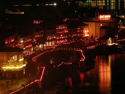 La piazza di Cannobio illuminata da candele per la Festa dei Lumineri, 7-8 gennaio di ogni anno